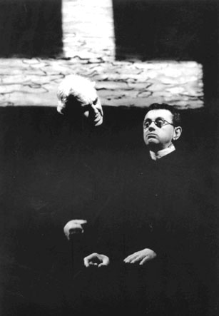 Yann-Vadezour Lagadeg o c'hoari-pezh e "Ar Mestr" gant Strollad ar Vro Bagan.